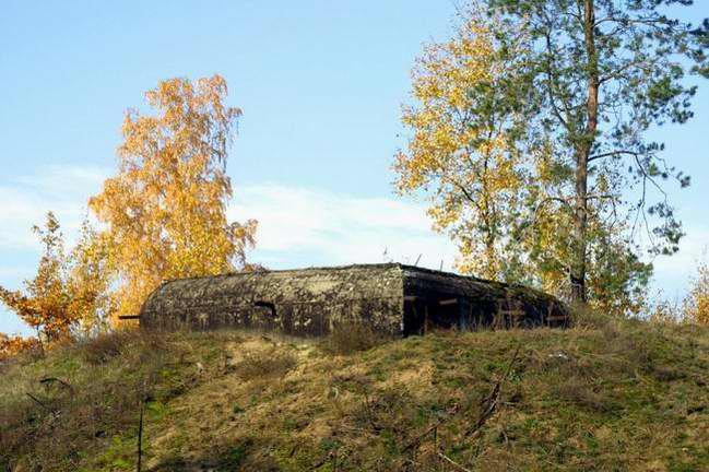 Linia Mołotowa - Zambrowski Rejon Umocniony.